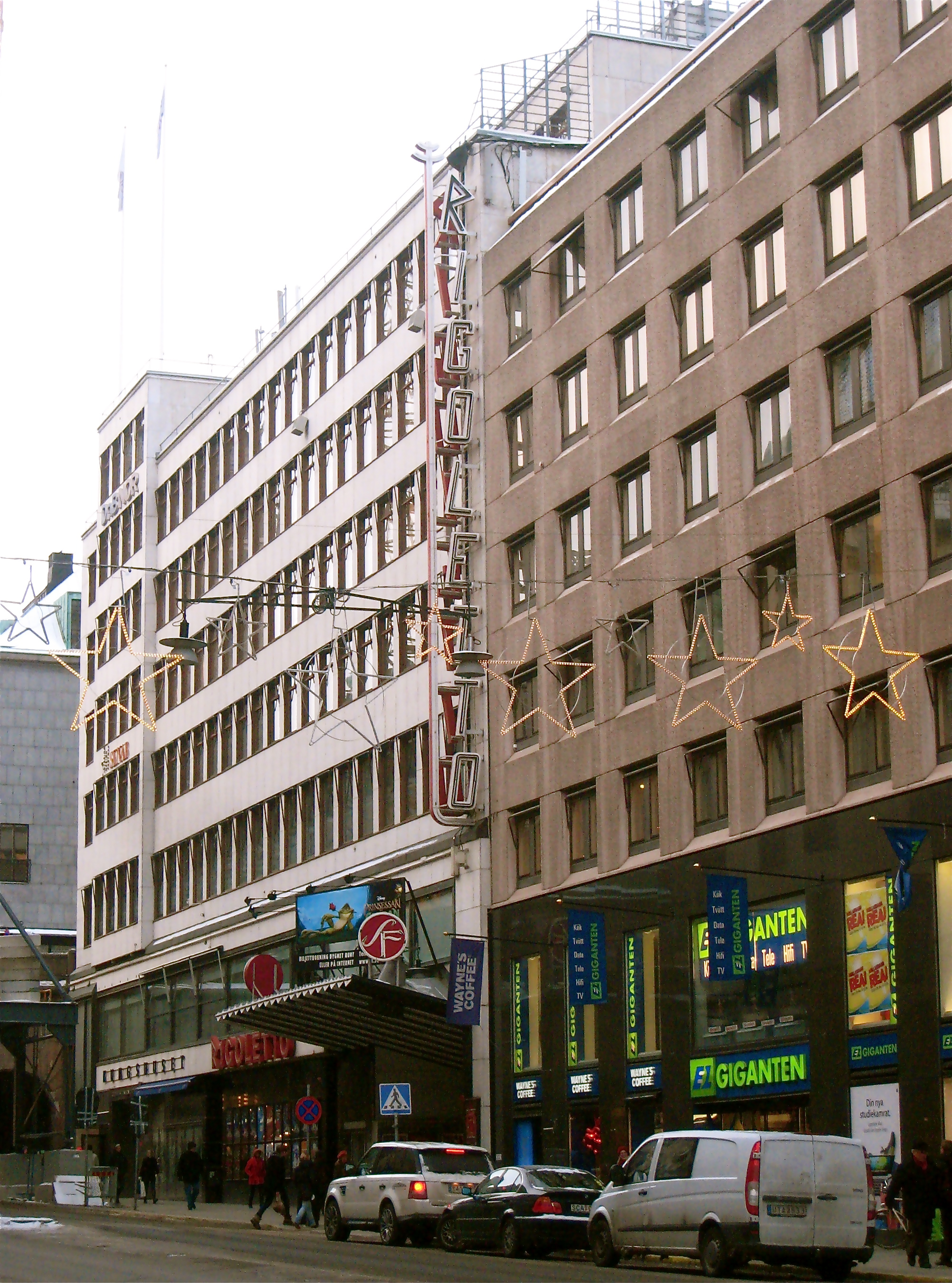 Kungshuset på Kungsgatan 18 i Stockholm uppförd av Videgård 1938-40. Artikel: Gösta Videgård.